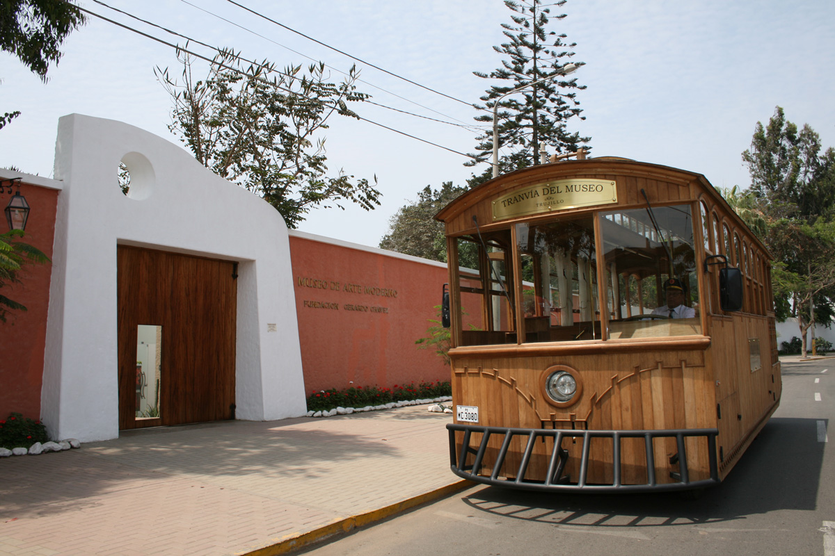 Museo de Arte Moderno